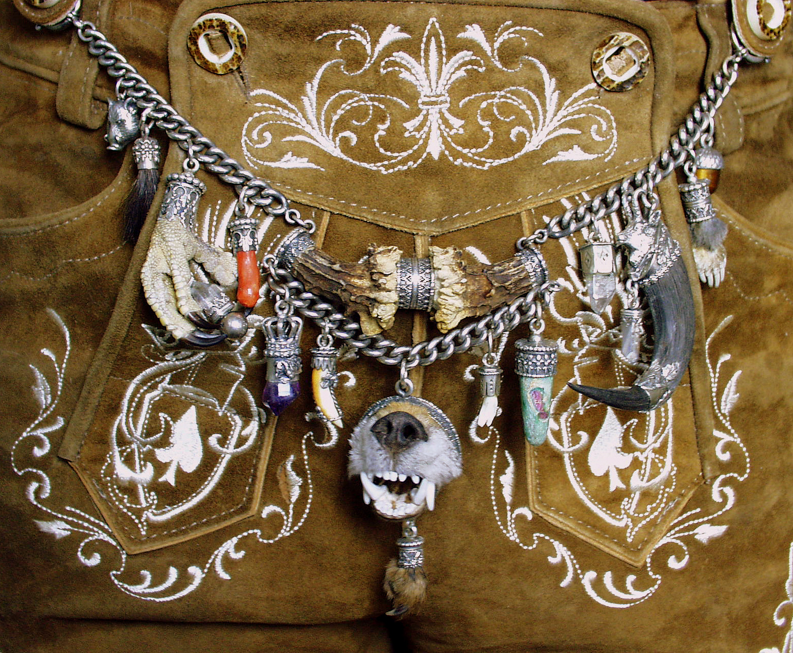 "klassisches" Jagd- & Prunk-Charivari mit u.a.Fuchsschnauze als Zentrum, Halbedelsteinen, Greifvogelkralle, Gamskrickl und "Schergraberl" (Maulwurfspfote).Oberbayern, ca. Ende des 20.Jhdts